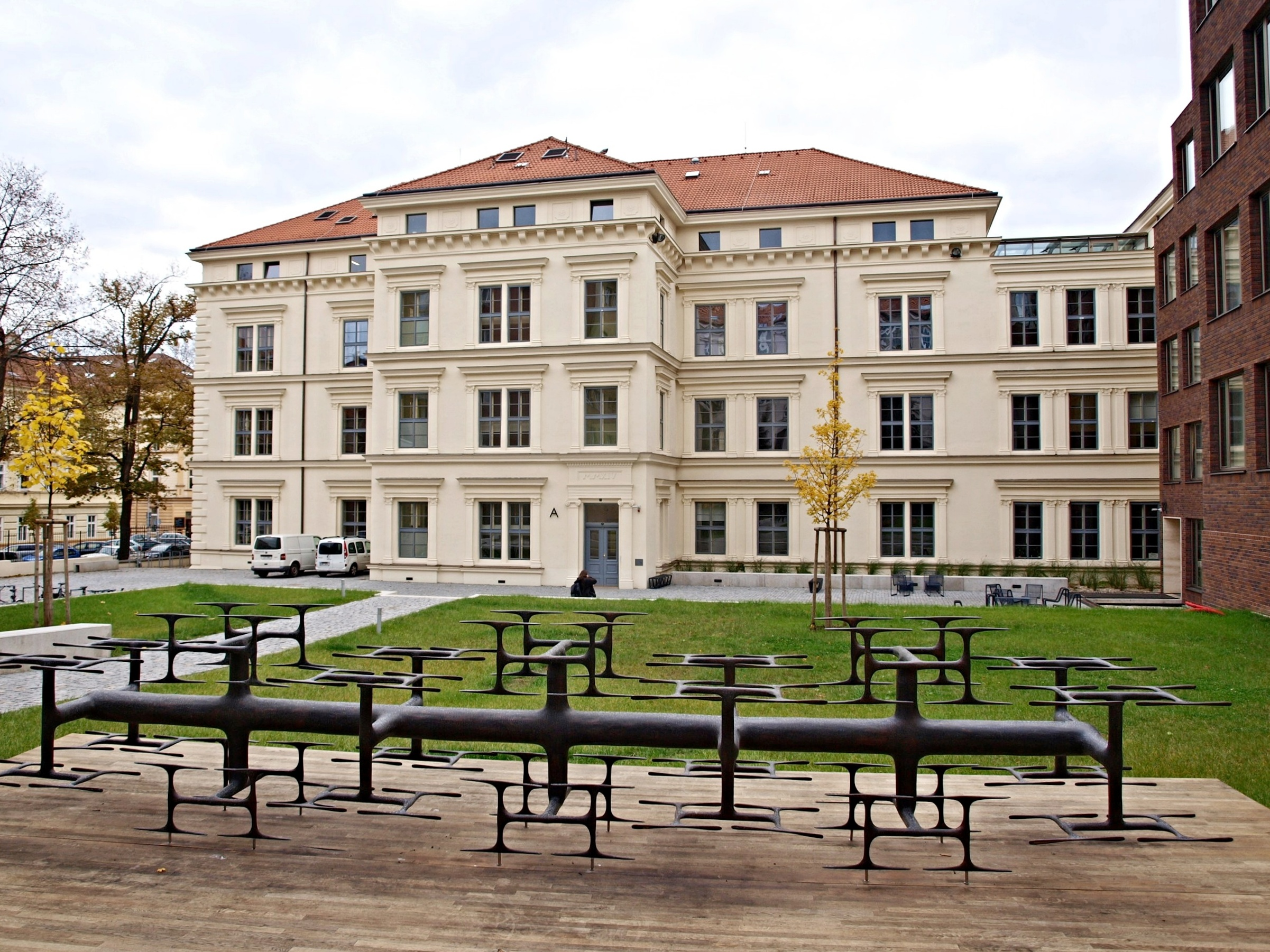 Filosofická fakulta MUNI, Brno